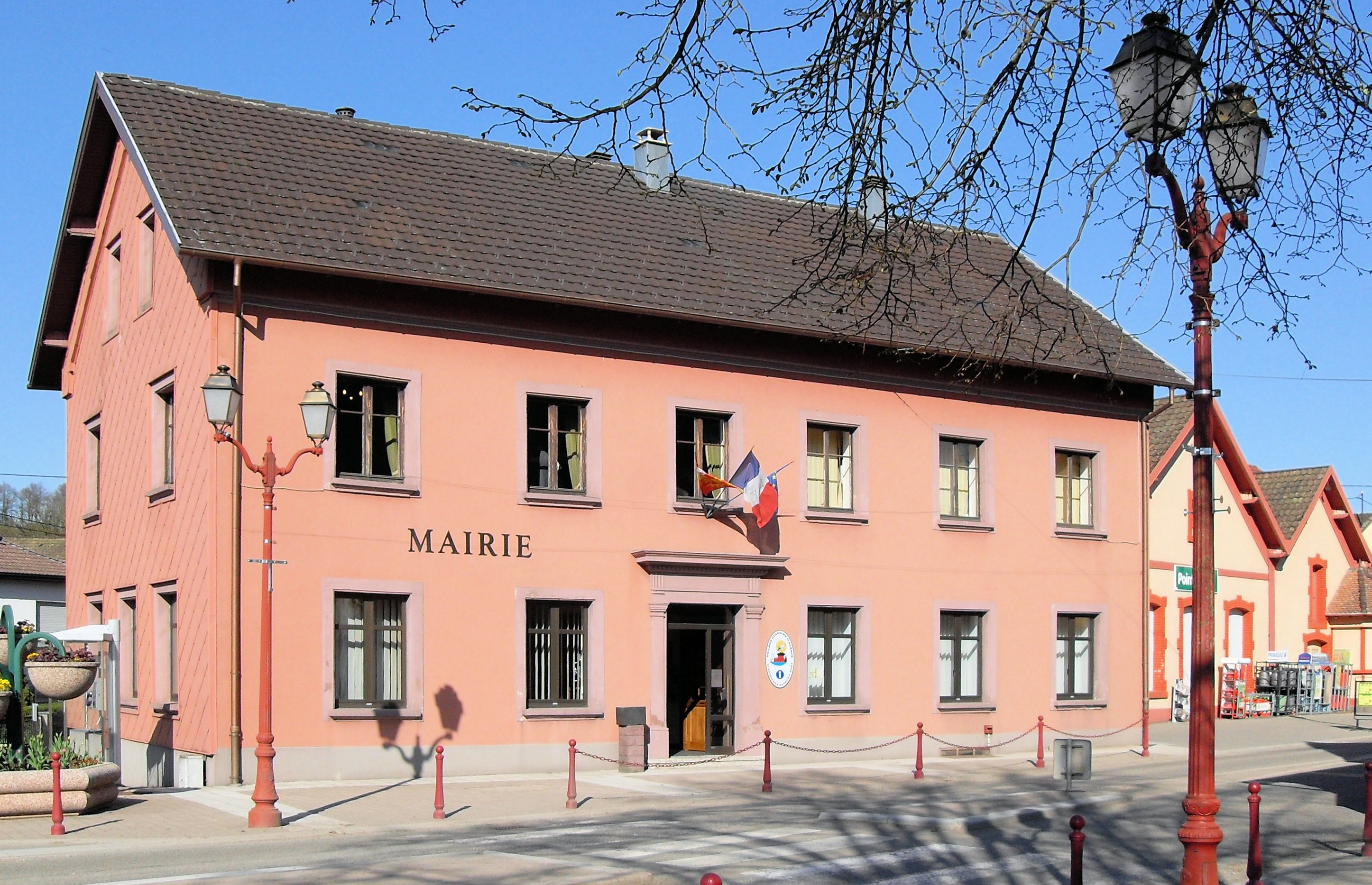 La mairie de Sentheim